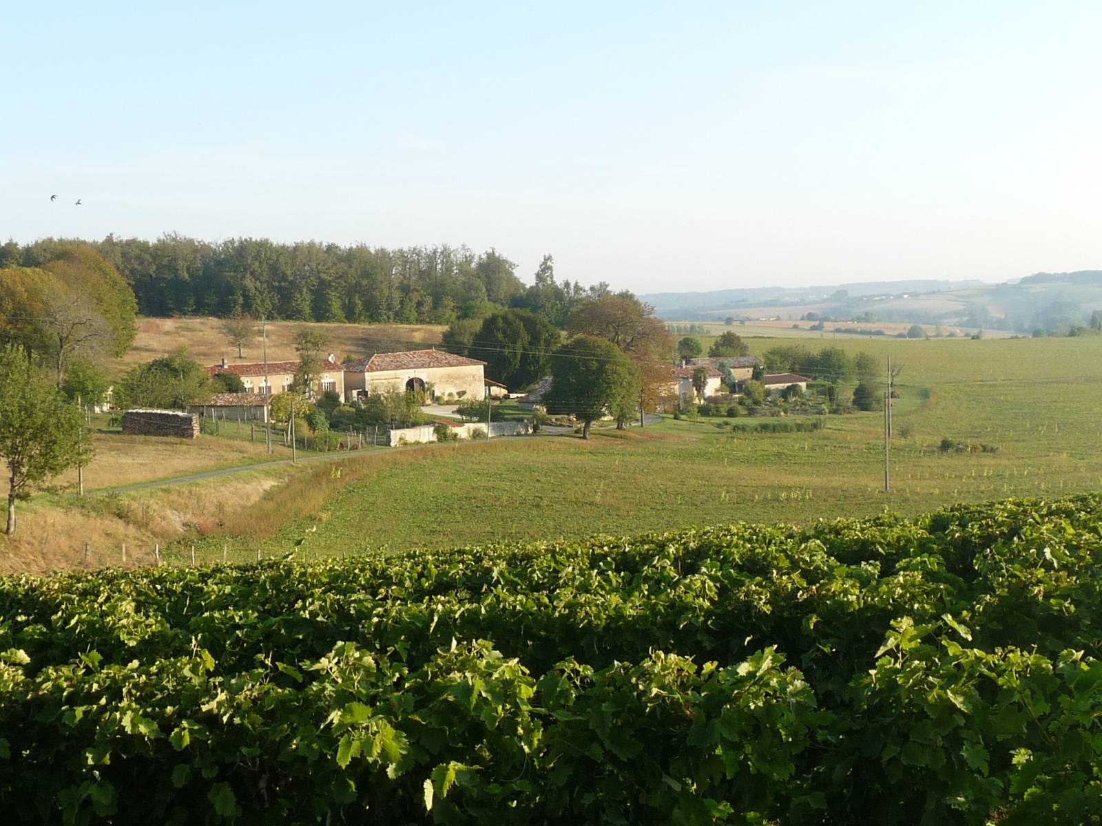 vue près de Bessac (16), France